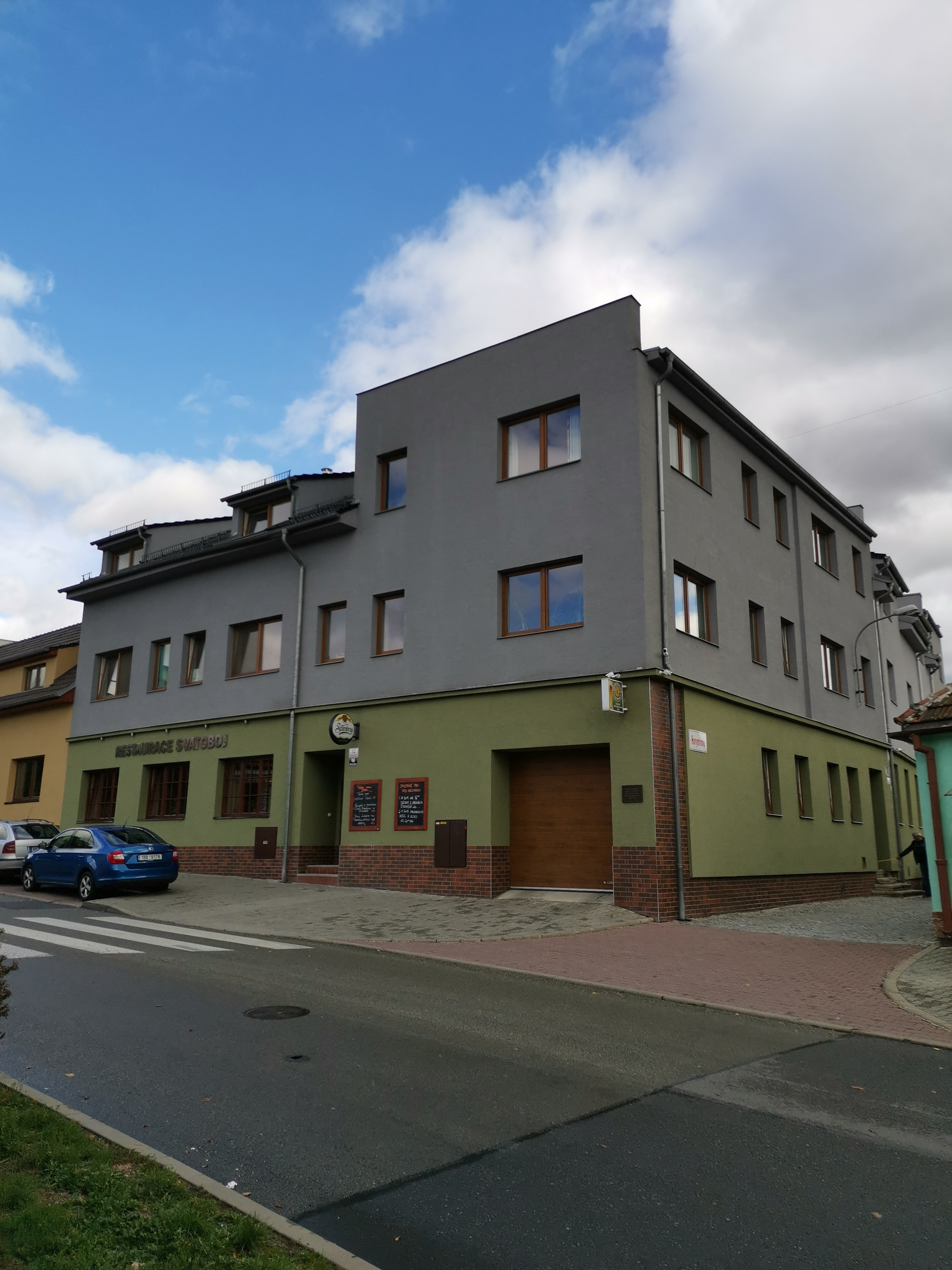 Budova bývalého Divadla Svatoboj v r. 2019 na ulici Cacovická